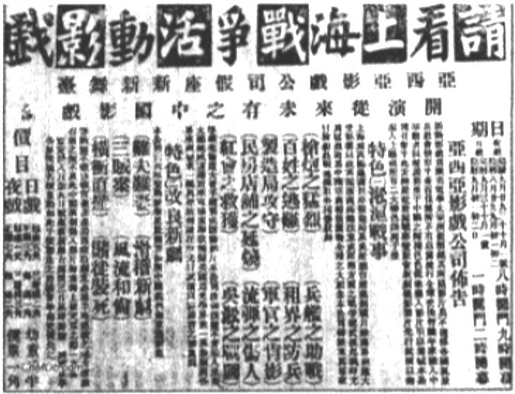 1913年电影《难夫难妻》的海报